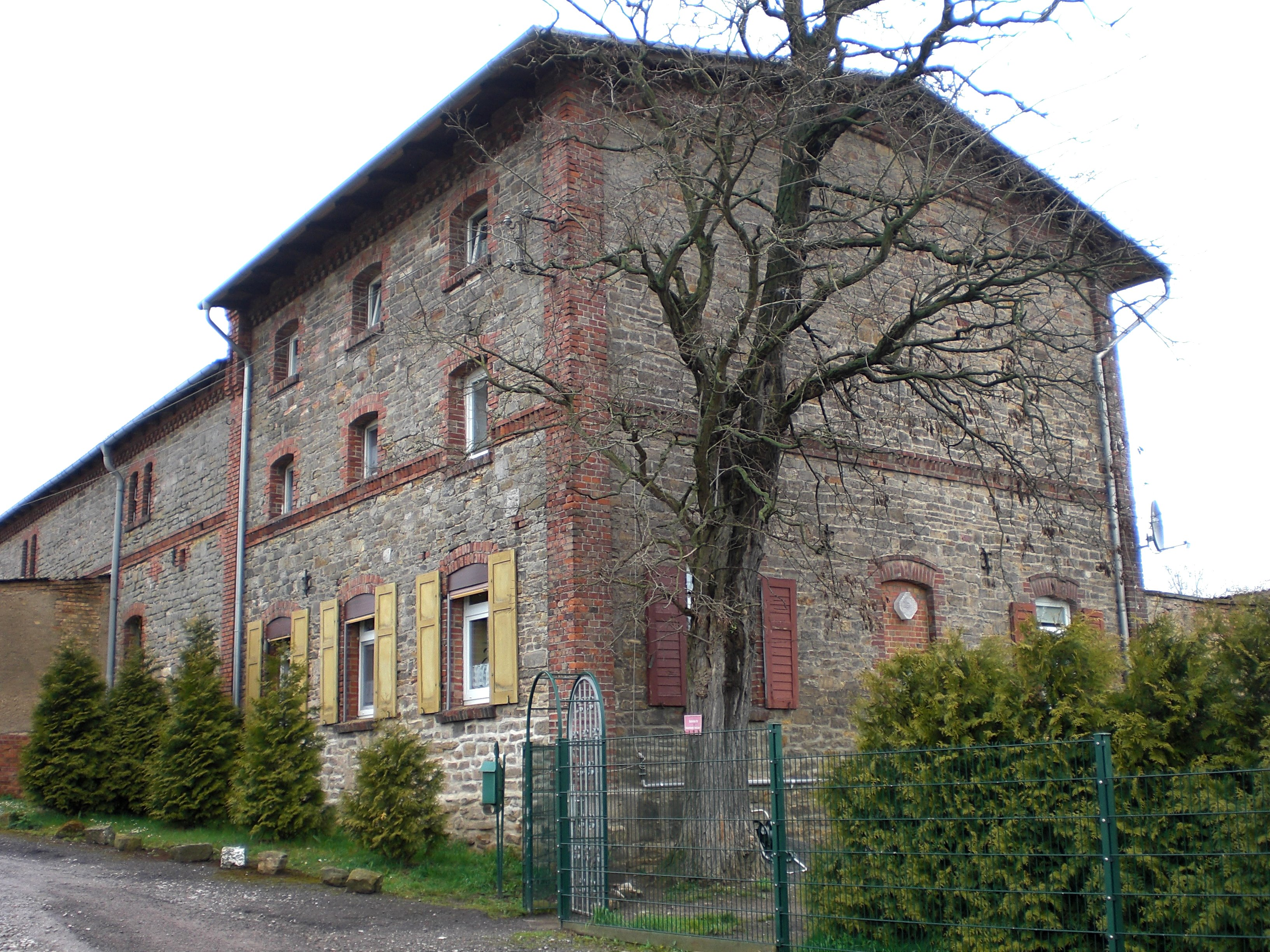 Gebäude im südlichen Teil von Andersleben